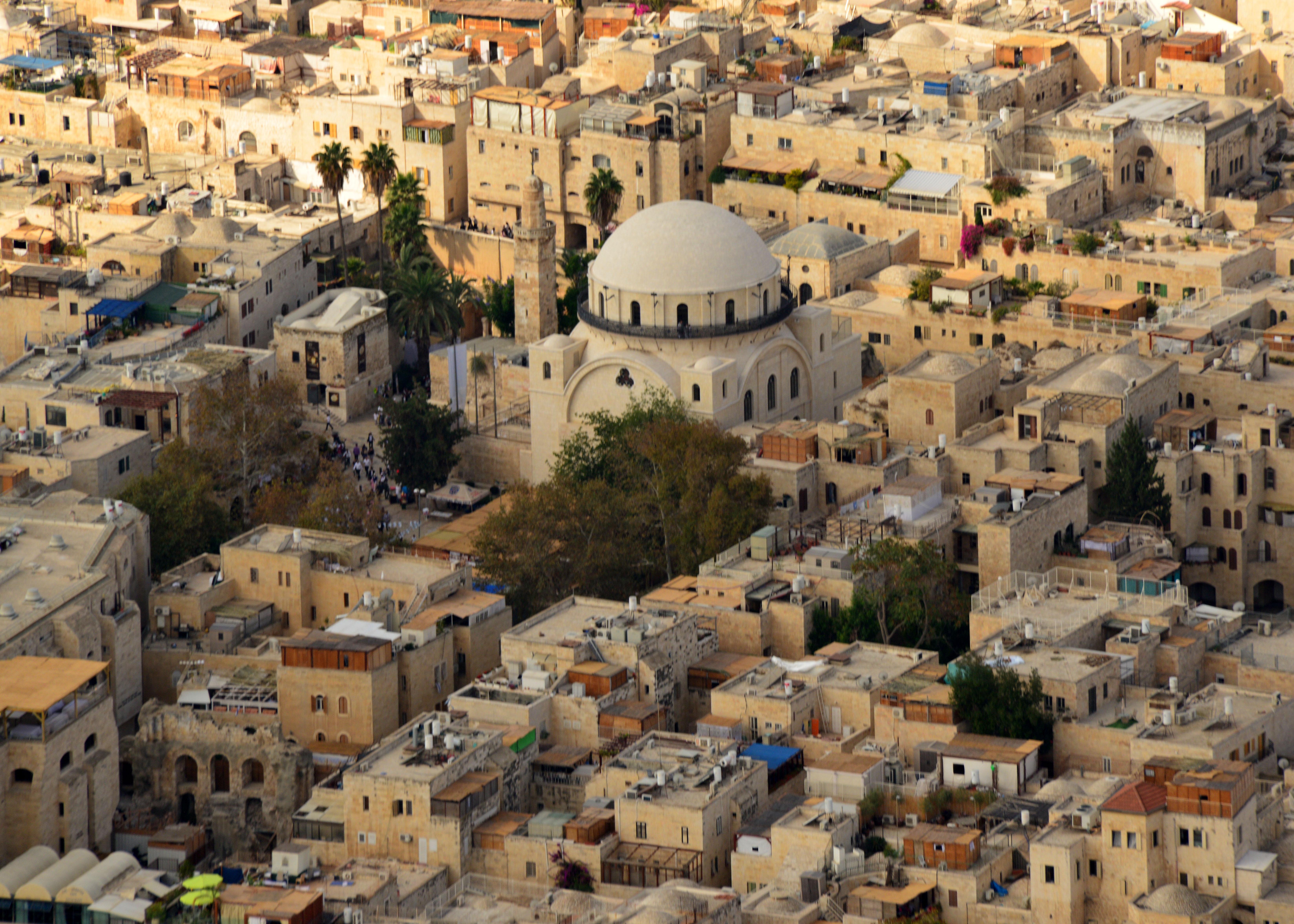 בית הכנסת החורבה או חורבת רבי יהודה החסיד הוא בית כנסת במרכז הרובע היהודי בעיר העתיקה. הוא נבנה לראשונה ב-1700 על ידי חבורת רבי יהודה החסיד ונחרב פעמיים עד שנבנה בשלישית ב-2010.